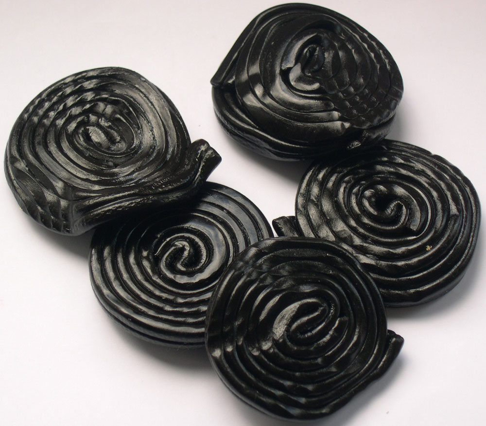 regaliz de HariboLiquorice Wheels